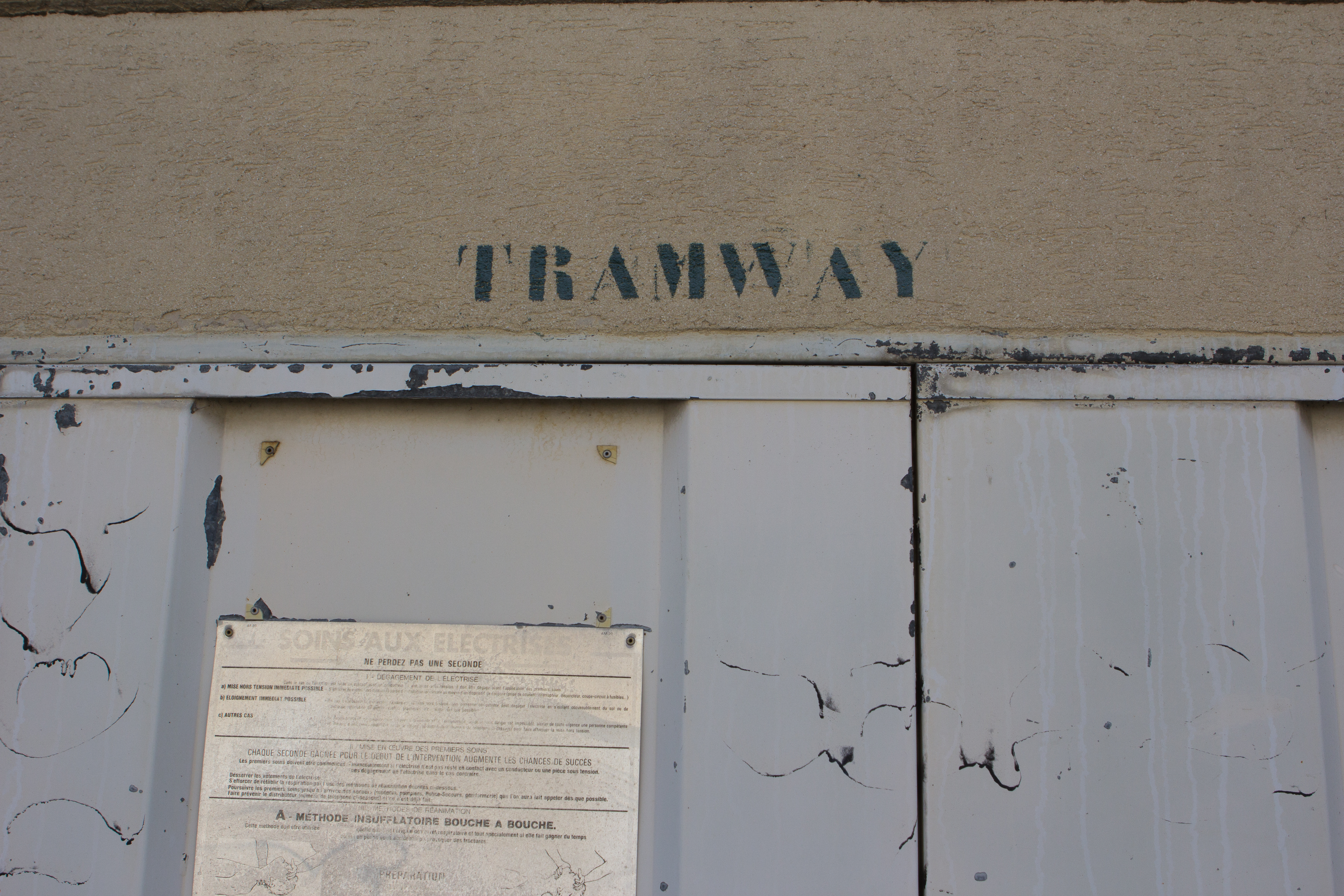 Rue du Chateau d'eau / Guignes, Seine-et-Marne, France